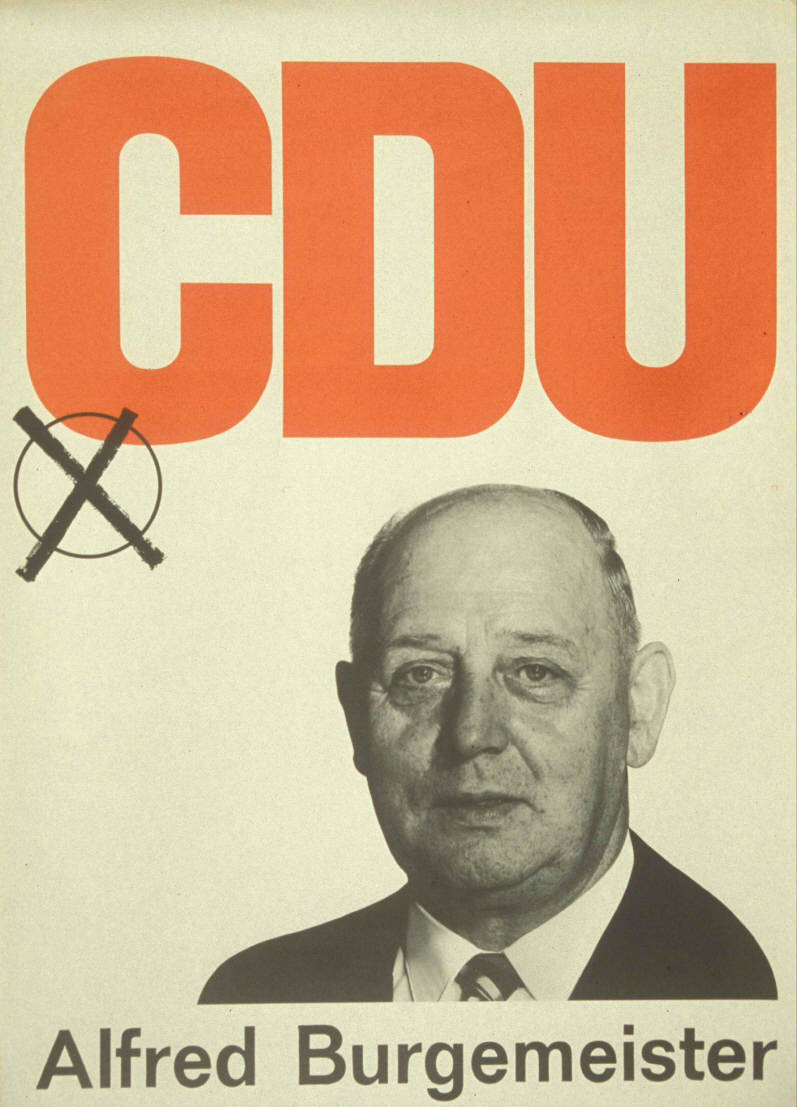 CDU Alfred Burgemeister Abbildung: Porträtfoto - Stimmkreuz Plakatart: Kandidaten-/Personenplakat mit Porträt Auftraggeber: CDU Bonn Drucker_Druckart_Druckort: KVD Köln Objekt-Signatur: 10-001: 1481 Bestand: Plakate zu Bundestagswahlen (10-001) GliederungBestand10-18: Plakate zu Bundestagswahlen (10-001) » Die 6. Bundestagswahl am 28. September 1969 » CDU » Mit Porträtfoto Lizenz: KAS/ACDP 10-001: 1481 CC-BY-SA 3.0 DE